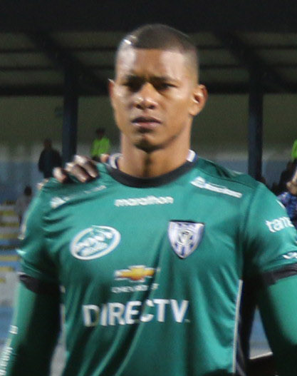 IDV vs MUNICIPAL